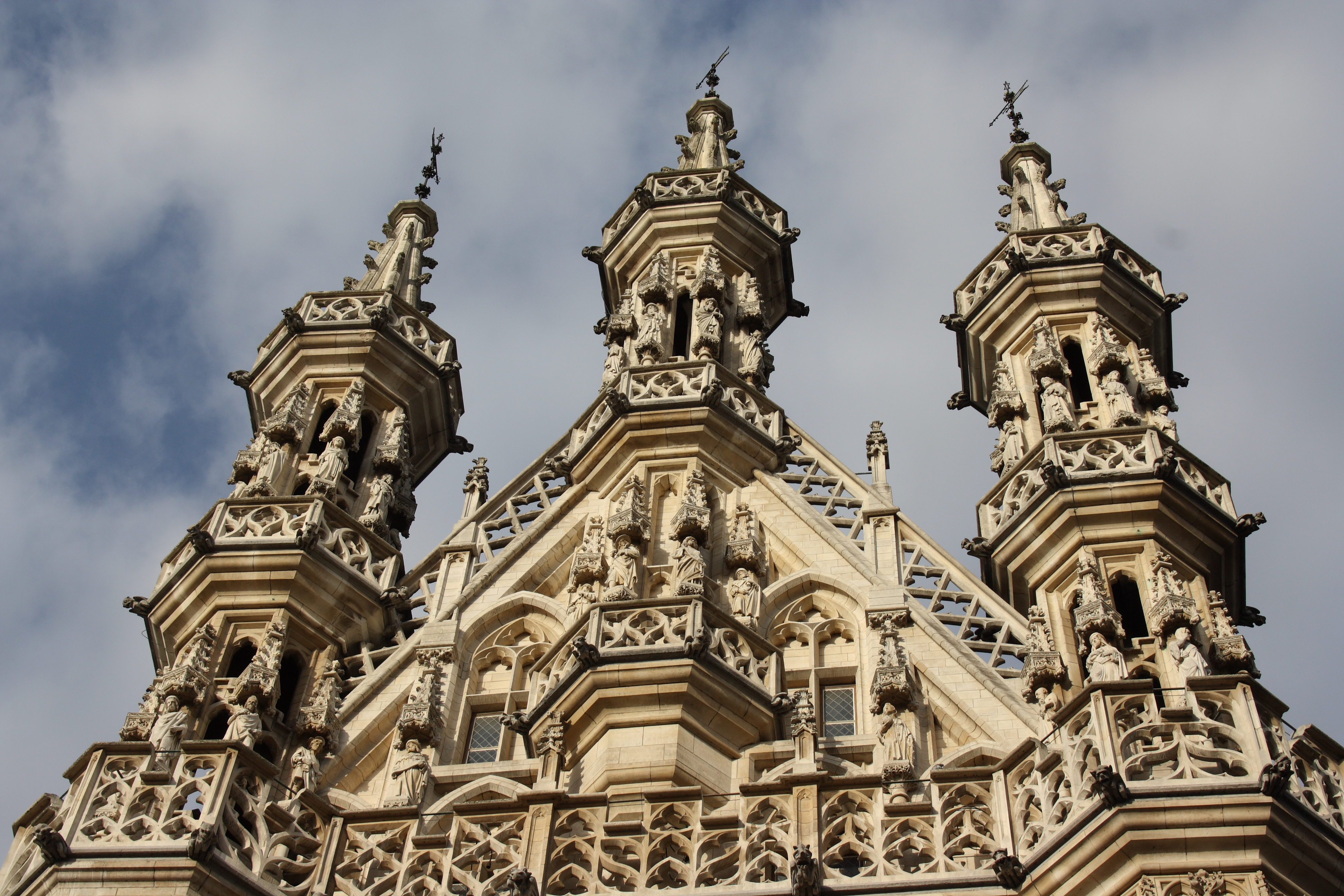 Rathaus von Löwen in der Provinz Flämisch-Brabant (Belgien), in der Mitte des 15. Jahrhunderts von Sulpitius van Vorst, Jan II Keldermans und Matheus de Layens errichtet